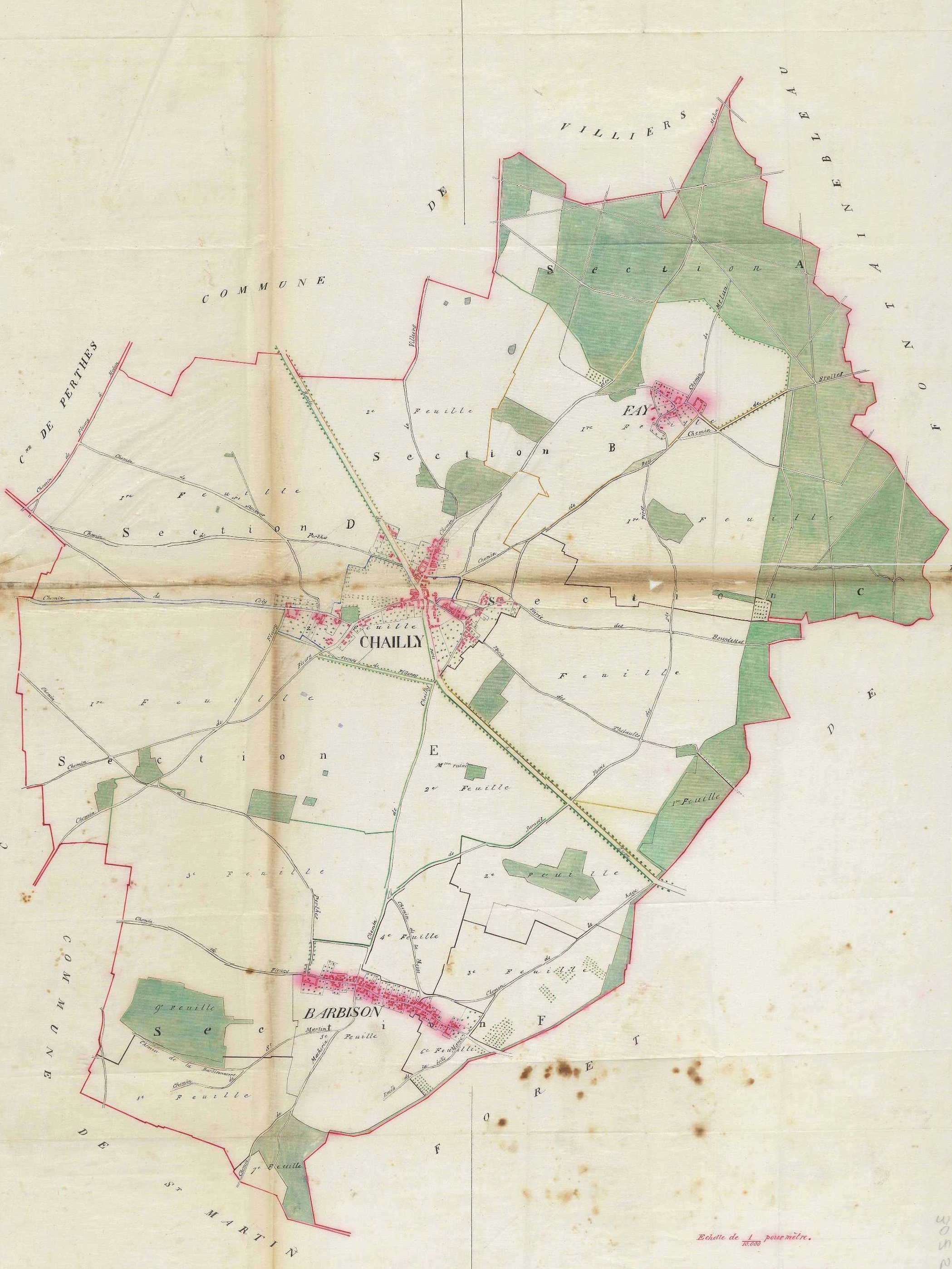 Ancien plan de Chailly-en-Bière et de ces hameaux au milieu du 19eme siècle (Seine-et-Marne, France).